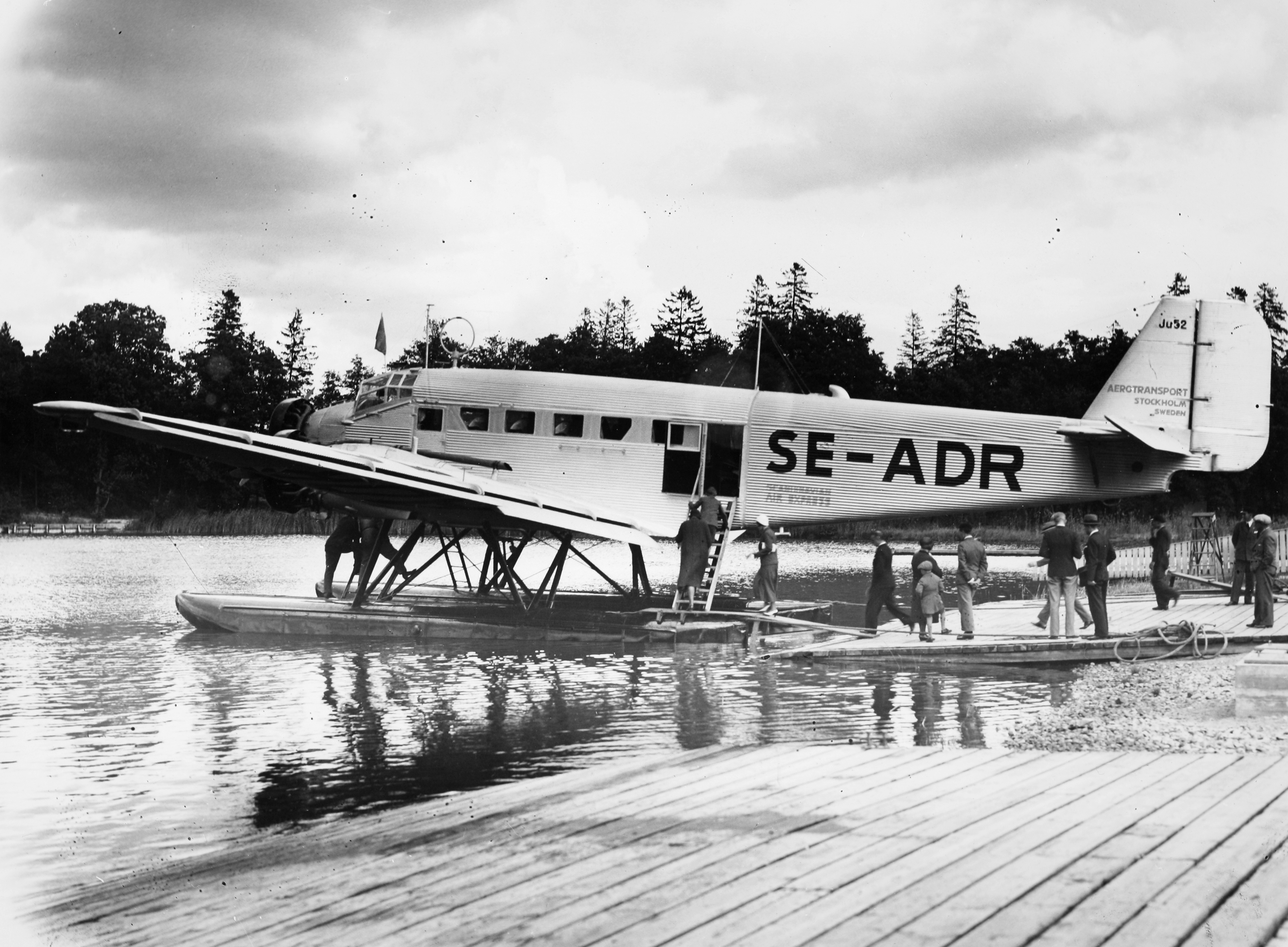 Junker Ju 52, Södermanland SE-ADR